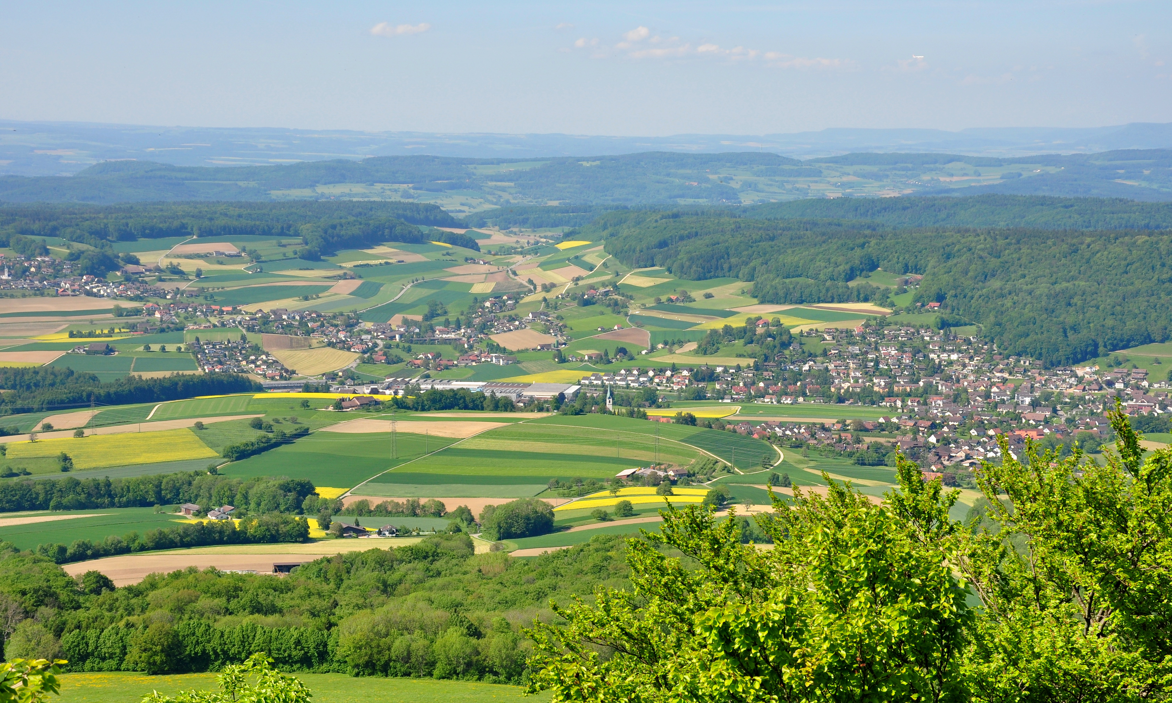 Niederweningen as seen from Burghorn respectively Jura-Höhenweg on Lägern (Switzerland)